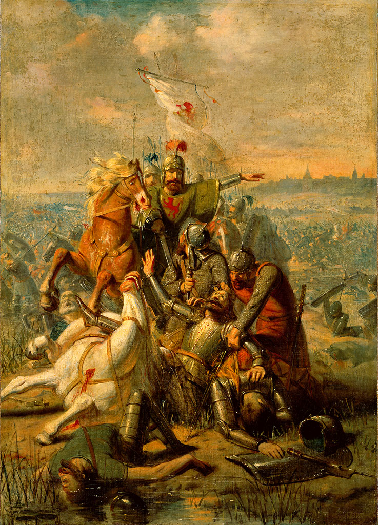 schilderij; Vos, Jacob de; geschiedenis (iconografie)